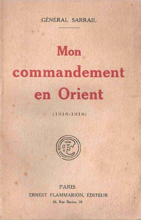 Mon commandement en Orient, 1916–1918